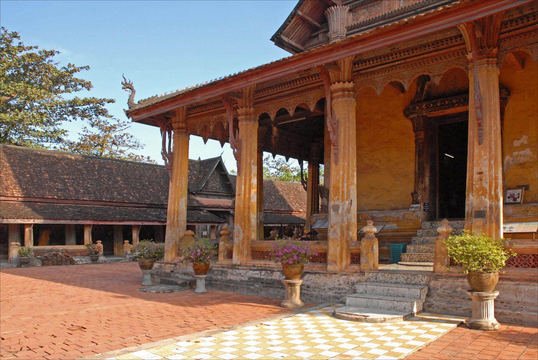 Le Vat Sisaket est le plus ancien monastère de Vientiane et l'un des plus importants, construit en 1818, sous le roi Anou. Il n'a pas été pillé lors des invasions siamoises, probablement en raison du style thaÏ qui caractérise son architecture et ses sculptures. L'ensemble est construit sur le modèle d'un vat laotien avec un mur d'enceinte dont la façade intérieure sert d'appui à une galerie. Au centre se trouve le sanctuaire appelé sim ou vihan. Dans cette galerie se dressent des milliers de statues du Bouddha faisant le geste de prise de la déesse de la Terre à témoin. La plupart des statues ont été sculptées entre les 16ème et 19ème siècles. Elles proviennent des pagodes détruites de Vientiane; de Luang Prabang et de l'art populaire des villages des environs. Le Sanctuaire ou Sim dispose d'une véranda entourant l'édifice pourvue de colonnes avec des chapiteaux à fleur de lotus. Les peintures murales révèlent l'influence de l'art d'Ayuthia (Thaïlande).